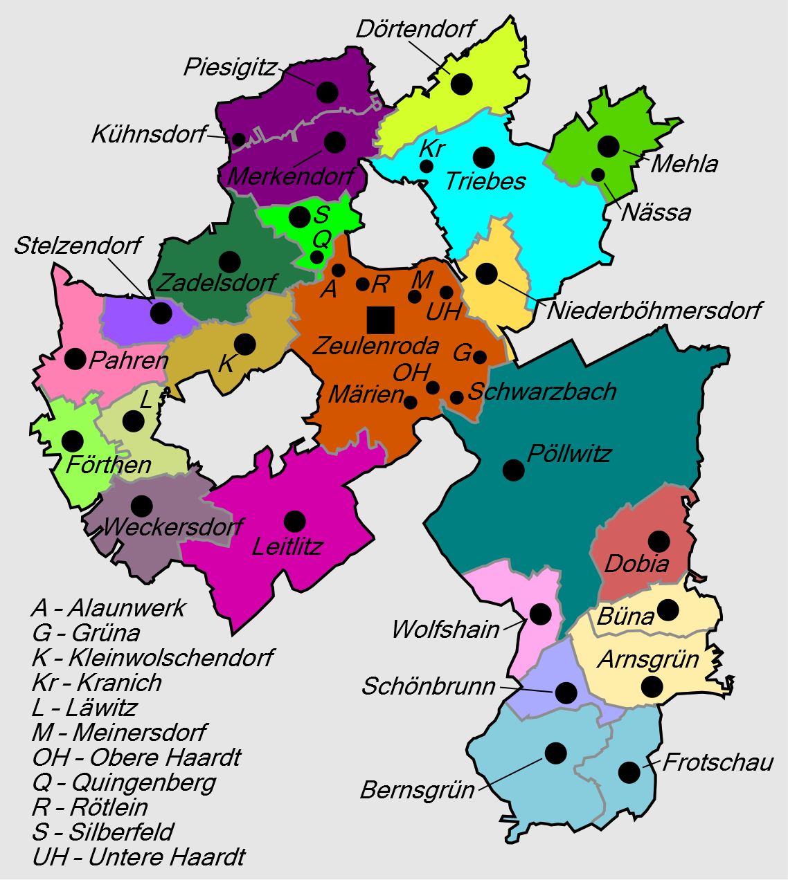 Gliederung der Stadt Zeulenroda-Triebes ab 1. Juli 1950